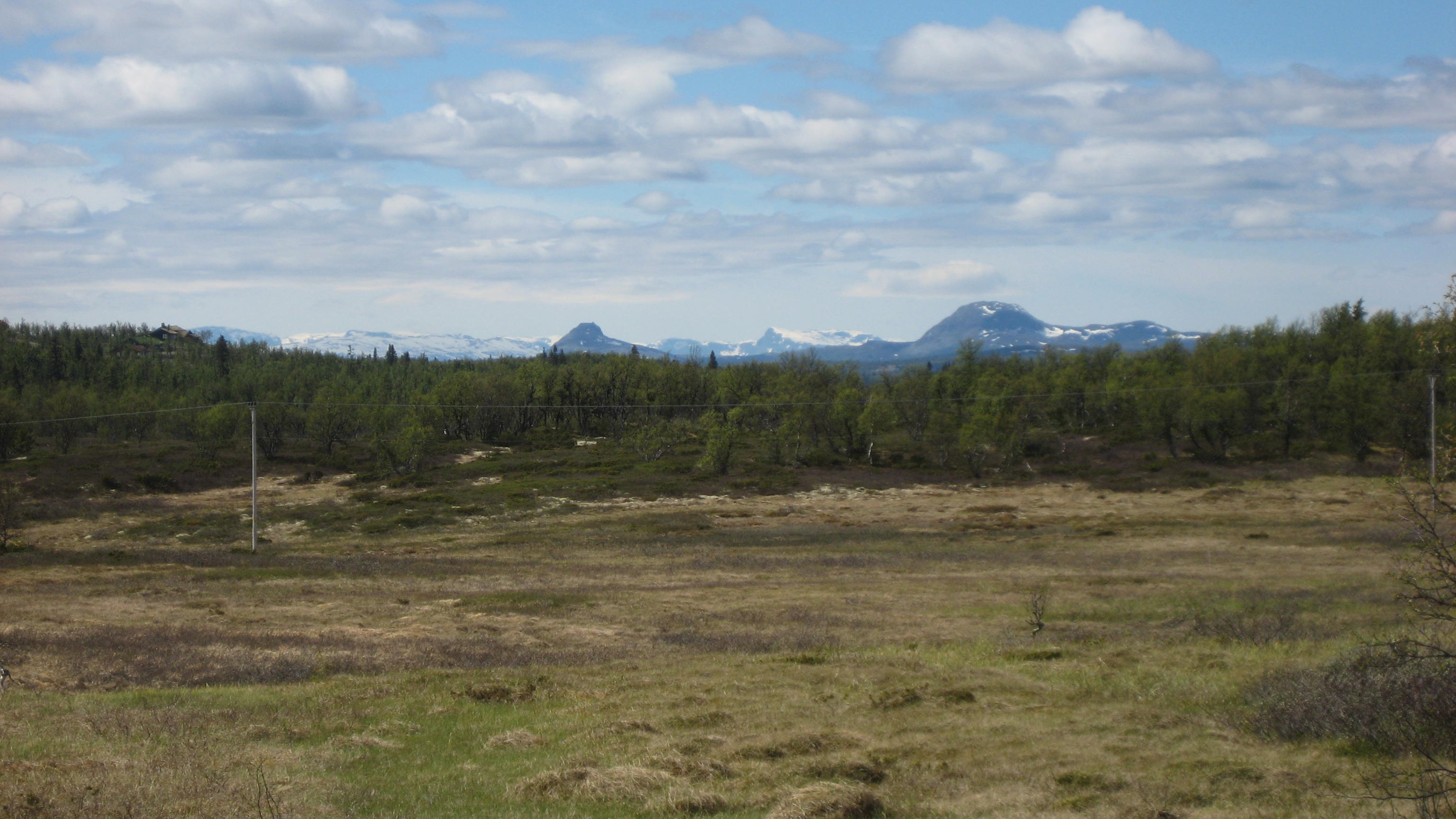 Skarvemellen og Rundemellen sett fra fylkesveg 204 ved Lenningen